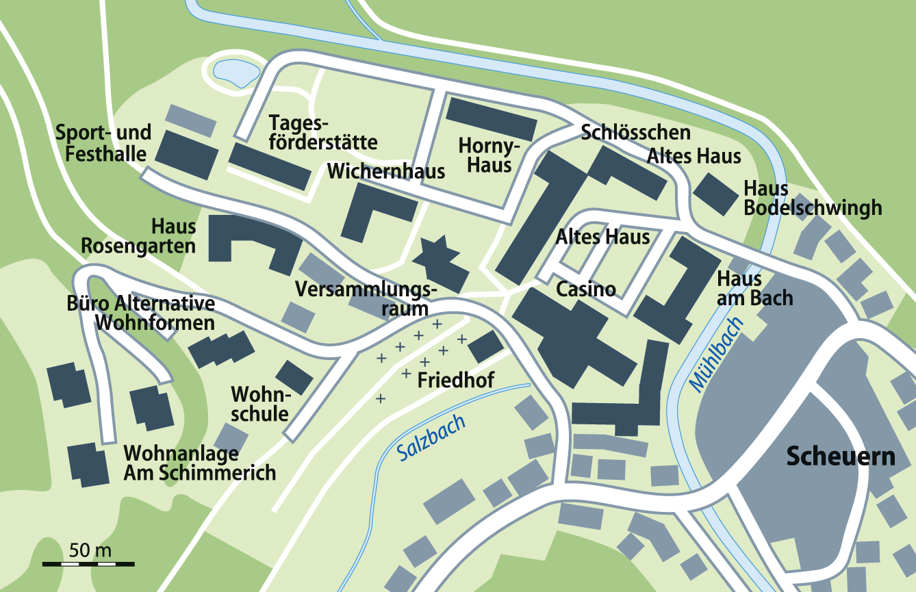 Karte der Heime Scheuern